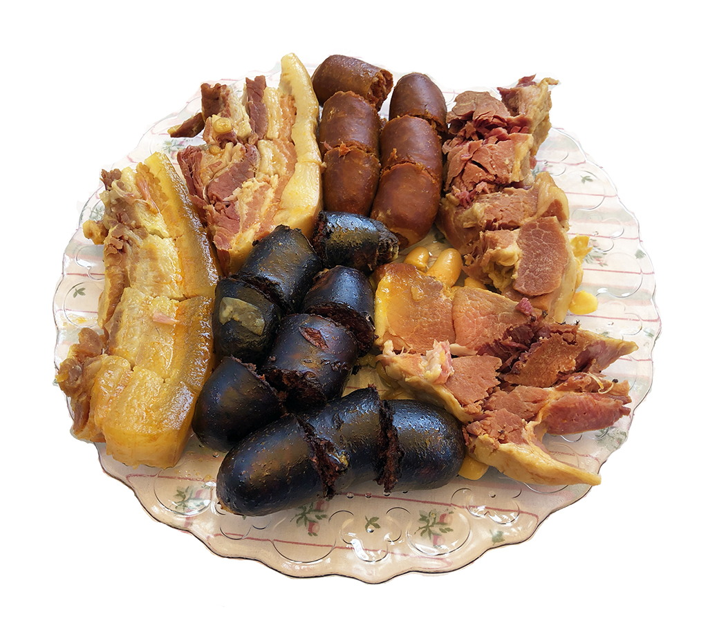 Compangu